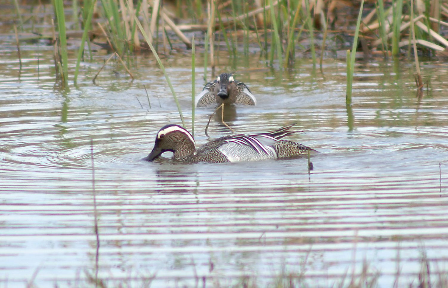 Cerceta carretona - Garganey Anas querquedula, males. Llobregat Delta, Barcelona, Spain